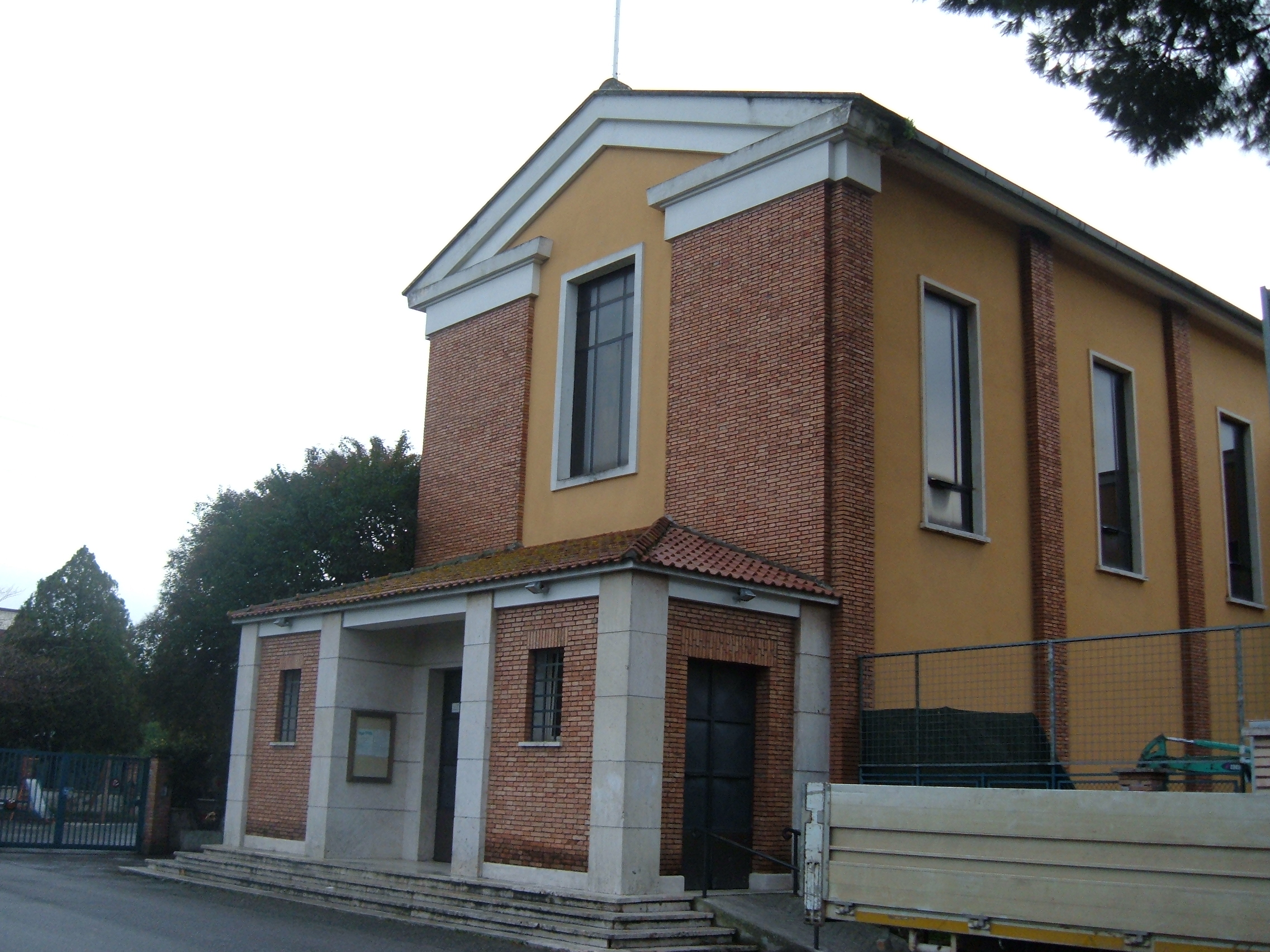 Chiesa di San Ferdinando re, zona Giardini Tor di Mezza Via, Roma.